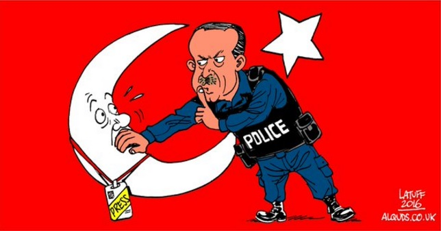 Erdoğan'ı sansürcü olarak figür eden Carlos Latuff karikatürü, 2016.